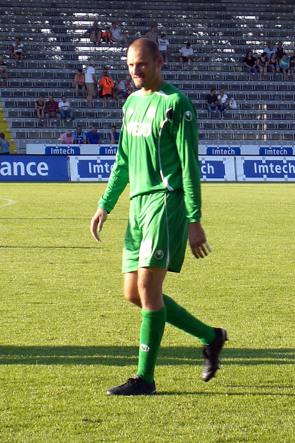 Robert Wulnikowski (Kickers Offenbach) nach einem Spiel gegen SK Sturm Graz in Aalen, 2010